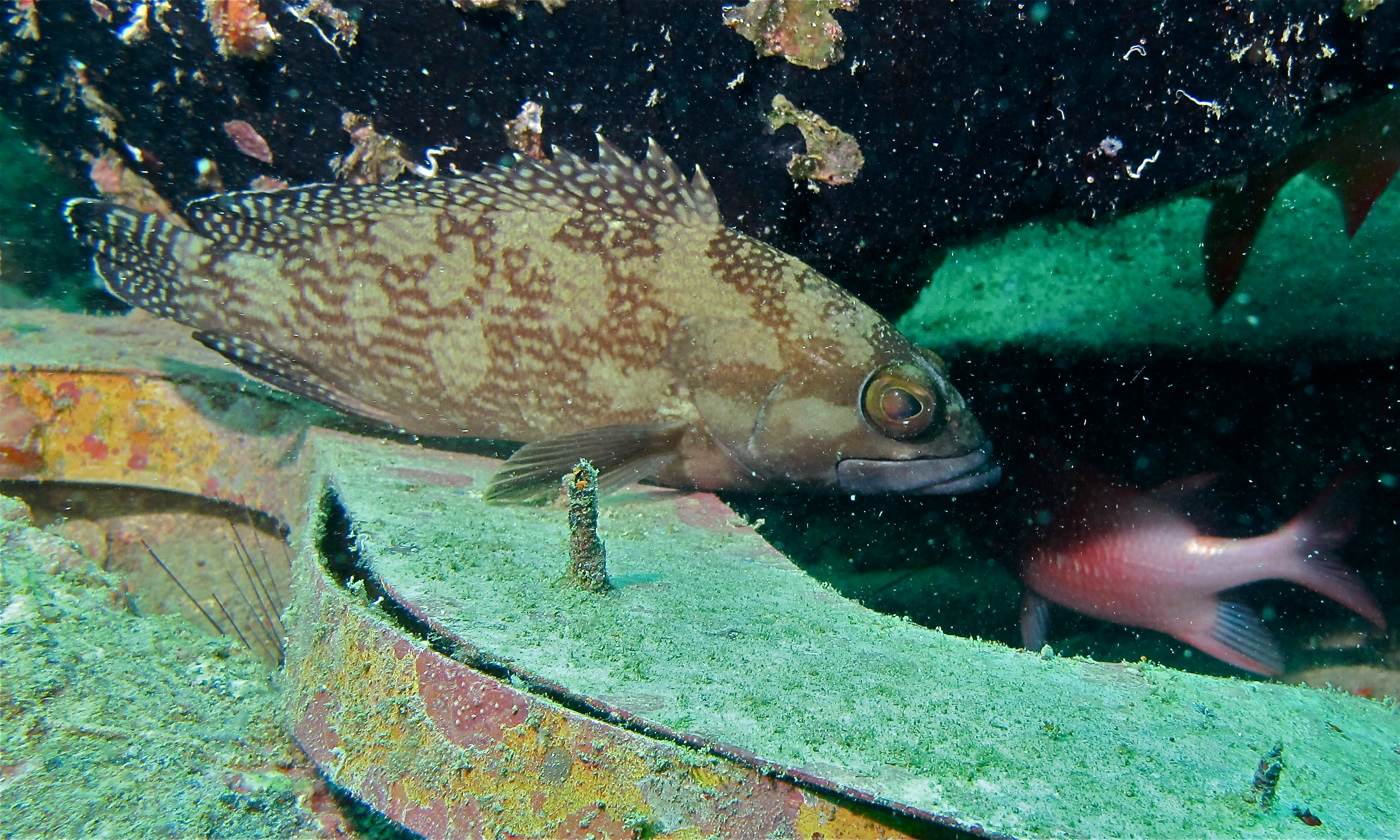 Seaventure, Mabul, Sabah, MALAYSIA